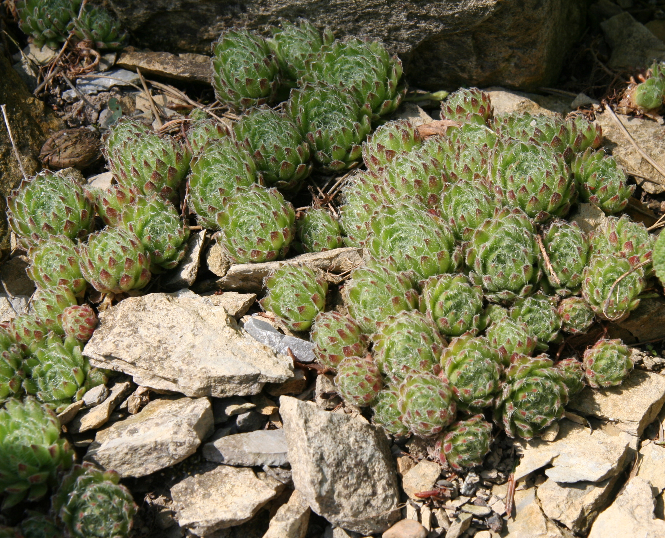 Sempervivum ciliosum im Botanischen Garten Dresden